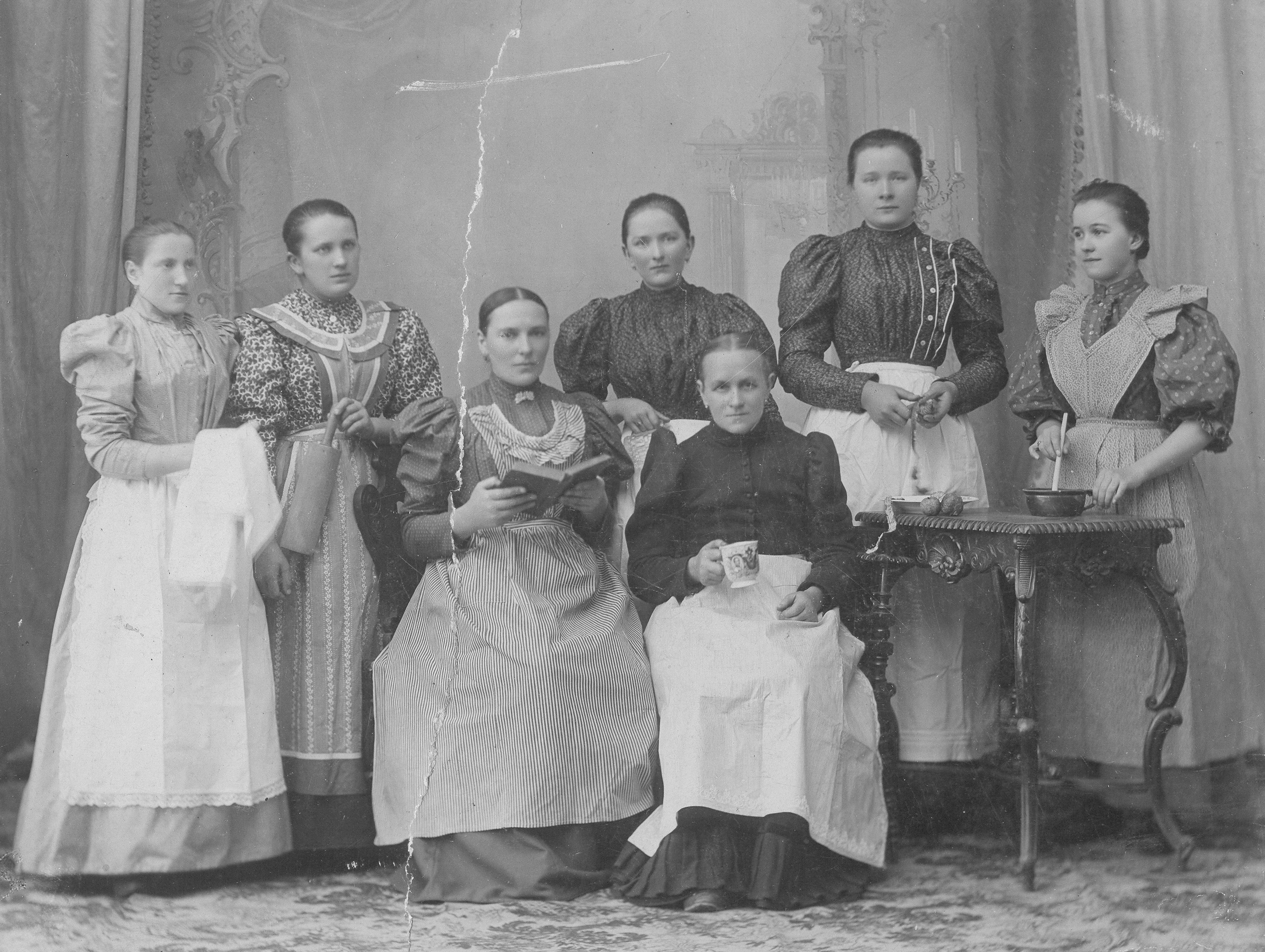 Kuchařky litoměřického kněžského semináře, foto kolem roku 1900, druhá zleva Nováková, nar. roku 1876